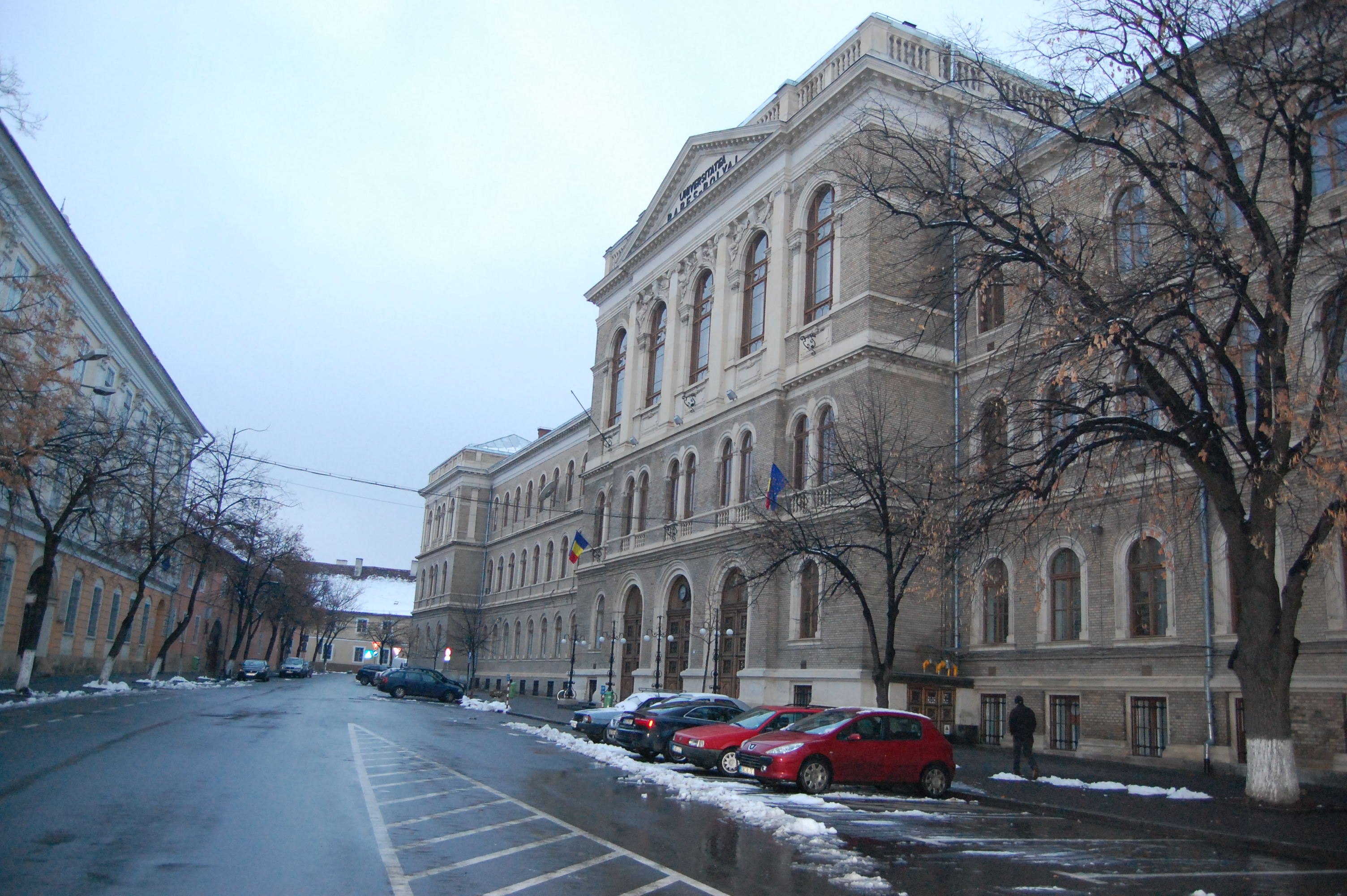 Universitatea "Babeș Bolyai"